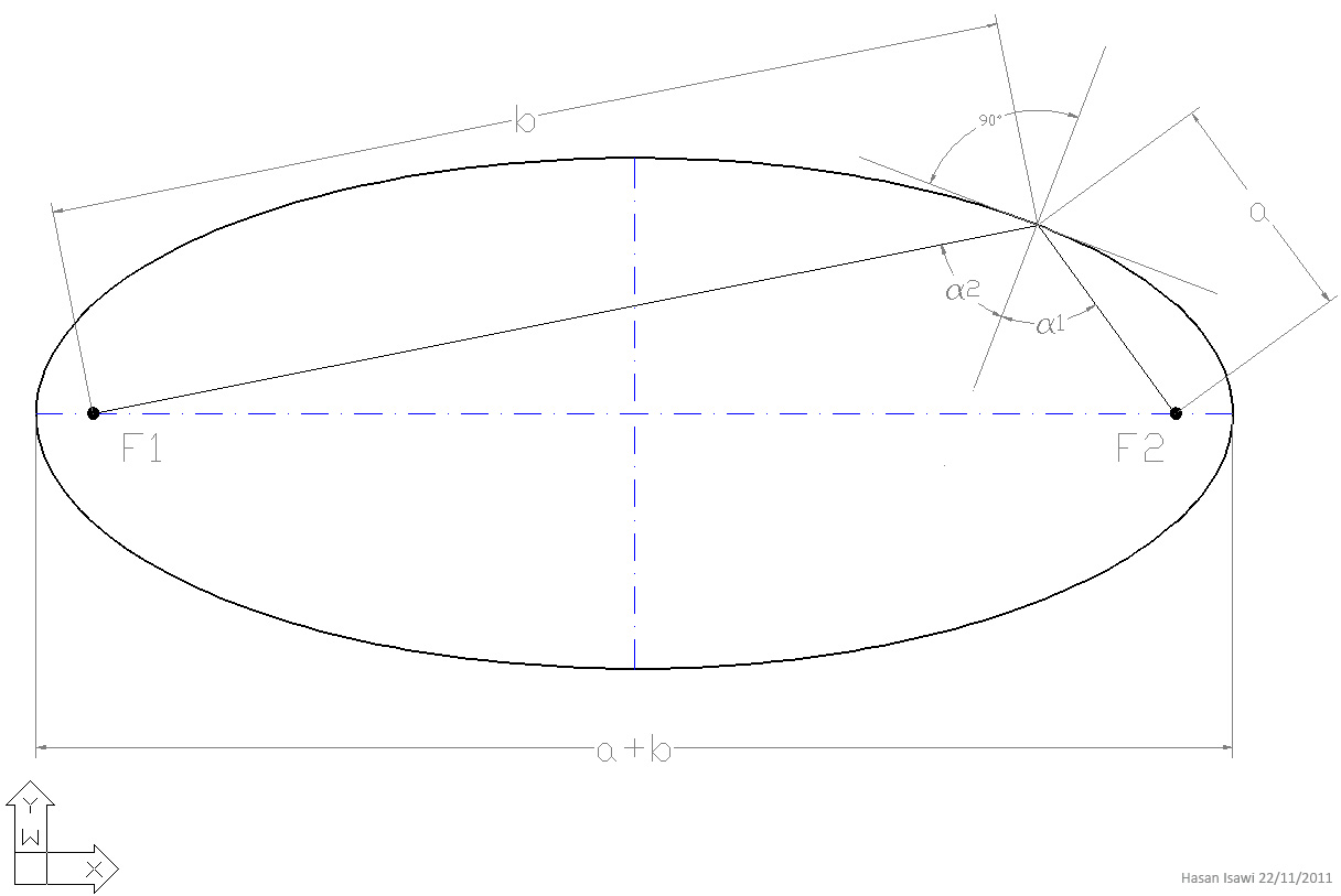 Una tangente all'ellisse in un suo punto P forma angoli uguali con le rette passanti per P e per ciascuno dei due fuochi. Vediamo alcune conseguenze di questo enunciato. In un tavolo da biliardo a forma di ellisse una palla lanciata da uno dei due fuochi verrà riflessa dal bordo e passerà necessariamente per l’altro fuoco. La stessa cosa si verificherà in uno specchio concavo a forma di ellisse nel quale tutti i raggi luminosi emessi da uno dei due fuochi passeranno necessariamente per l'altro fuoco indipendentemente dalla direzione seguita: da qui deriva il nome di fuochi dati a questi due particolari punti dell'ellisse. Analogamente, in una camera a forma di ellisse le onde sonore che partono da uno dei due fuochi raggiungeranno l'altro da tutte le direzioni e poiché la distanza percorsa nel tragitto da un fuoco all'altro è sempre la stessa le onde arriveranno tutte sincronizzate: questo spiega perché due persone poste nei due fuochi possono comunicare facilmente anche da lunghe distanze, mentre due persone, anche notevolmente più vicine tra loro ma non situate nei fuochi, potrebbero non sentire le parole dell’altra. Su questo principio si basa la costruzione di alcune sale.